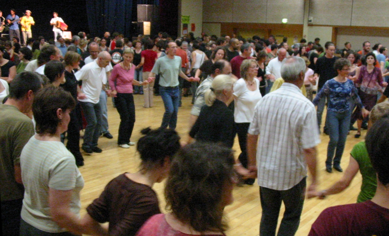 Fest noz à la Fête Mill Góll en Pays Gallo 2007